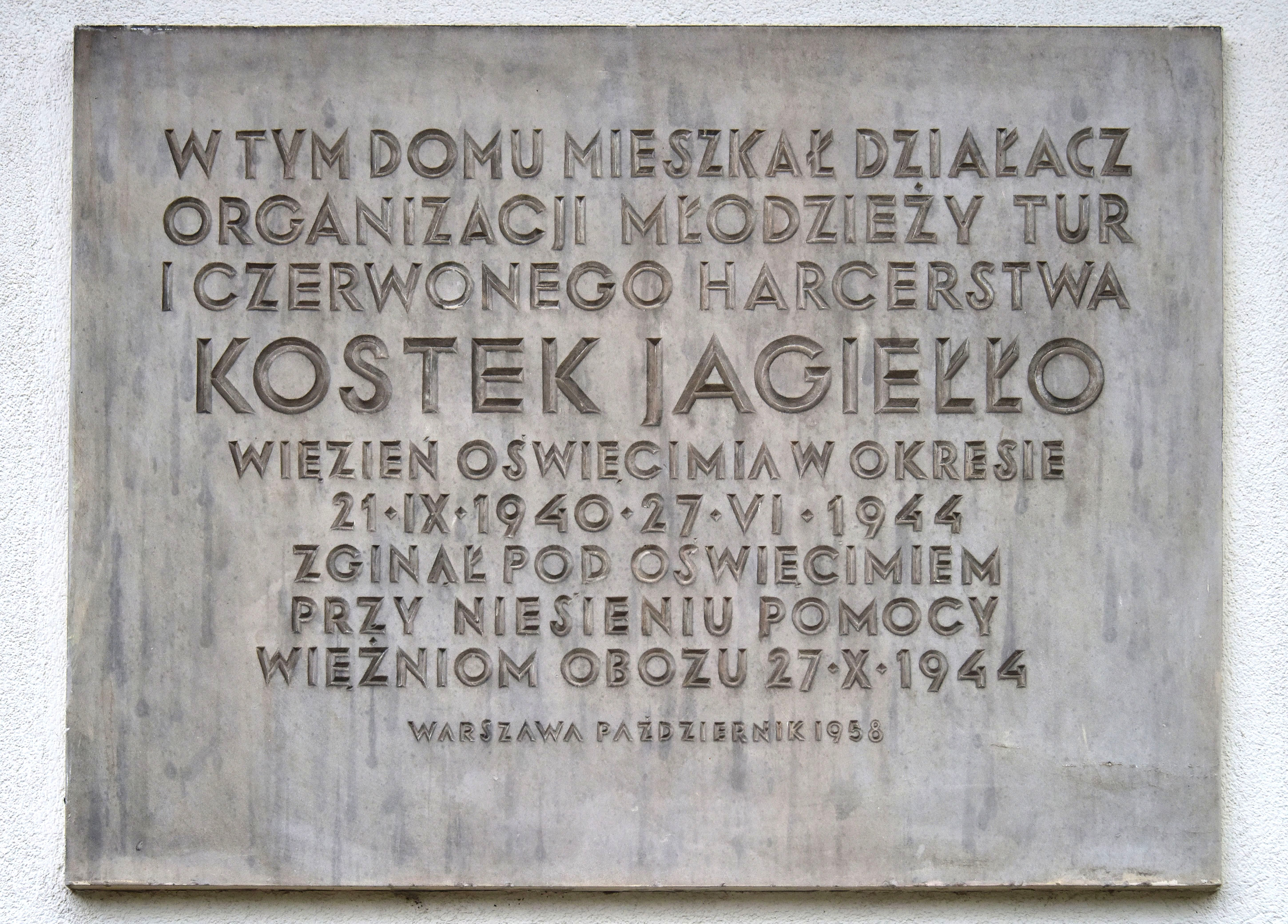 Tablica upamiętniającą Konstantego Jagiełłę przy ul. Krasińskiego 18 w Warszawie